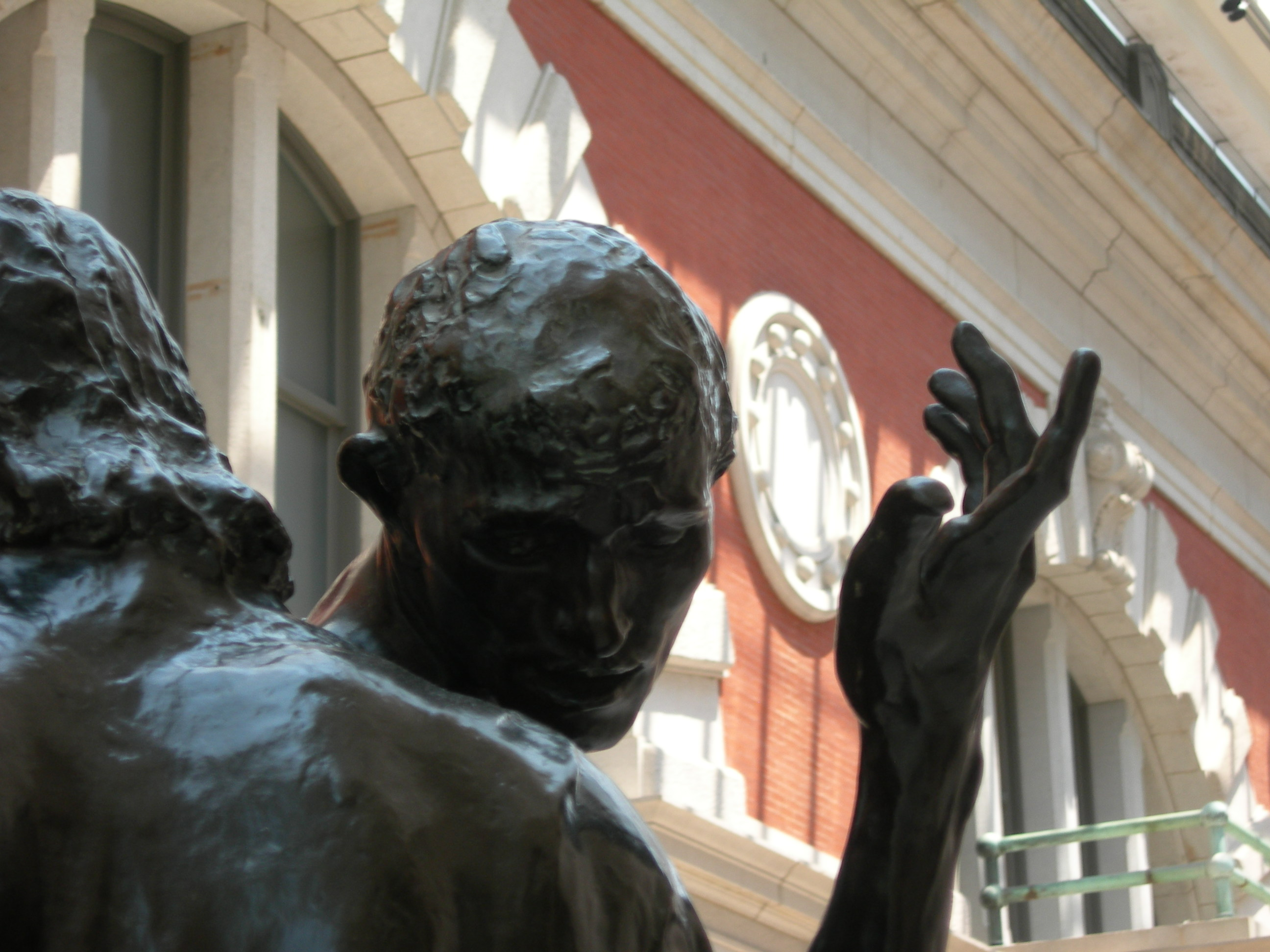 Les Bourgeois de Calais au Metropolitan Museum de New York, bronze fondu dans le moule que Rodin réalisa pour le groupe de Calais. Détail.